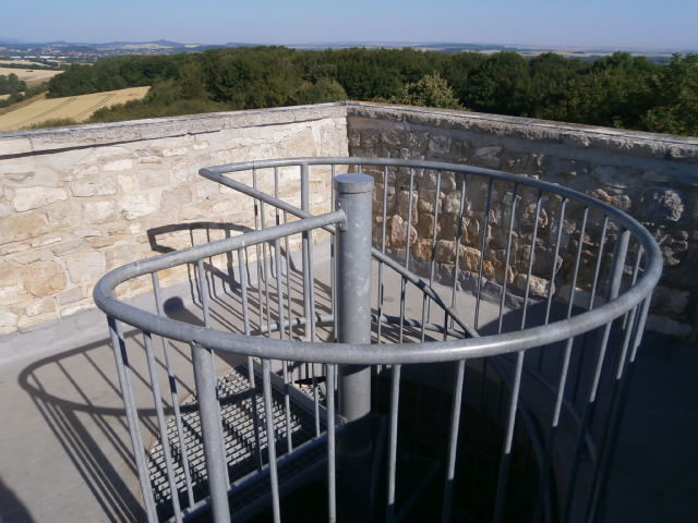 Sewekenwarte